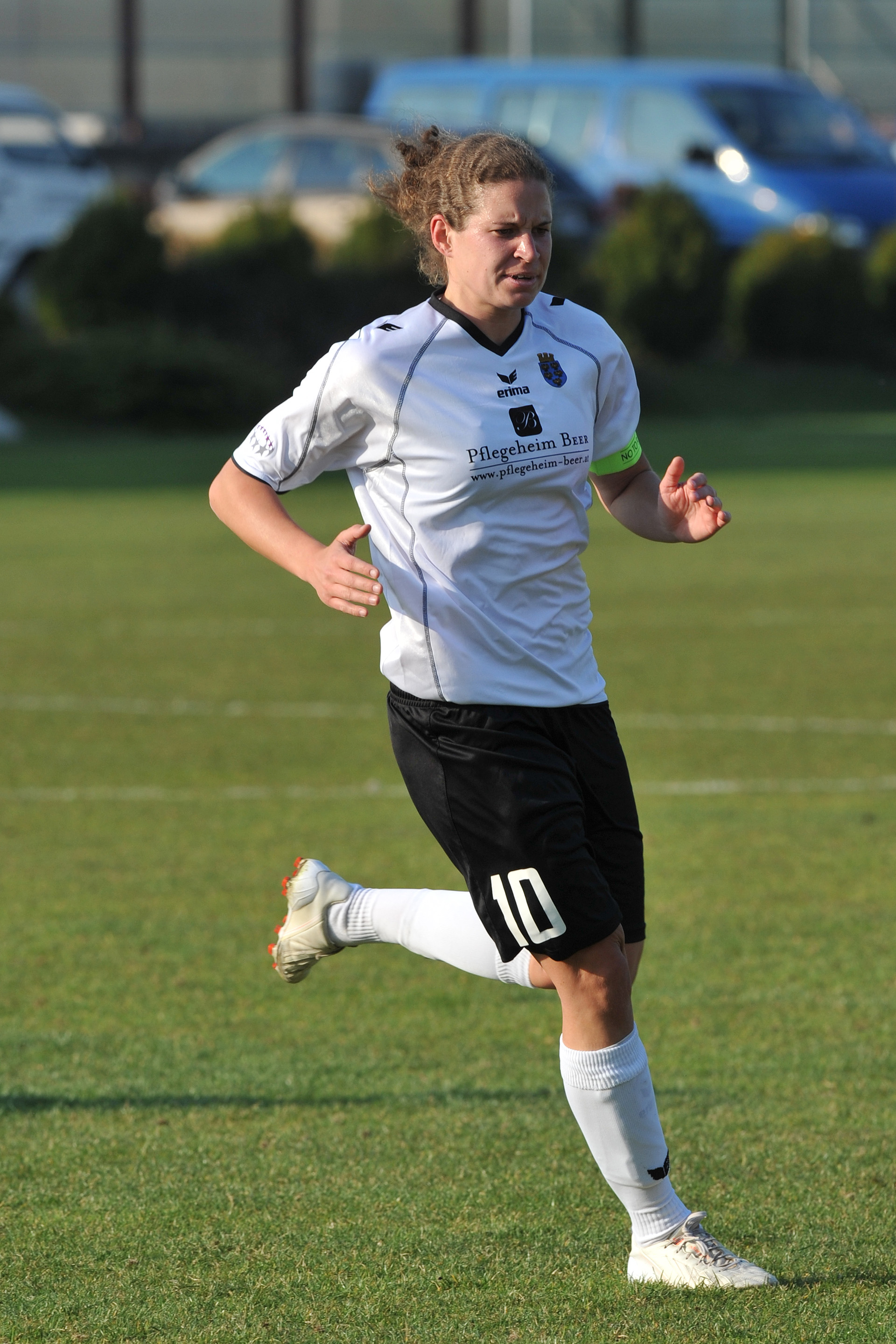 UEFA Women's Champions League 2013/14 SV Neulengbach - Tyresö FF Neulengbach, 29. März 2014 Nina Burger